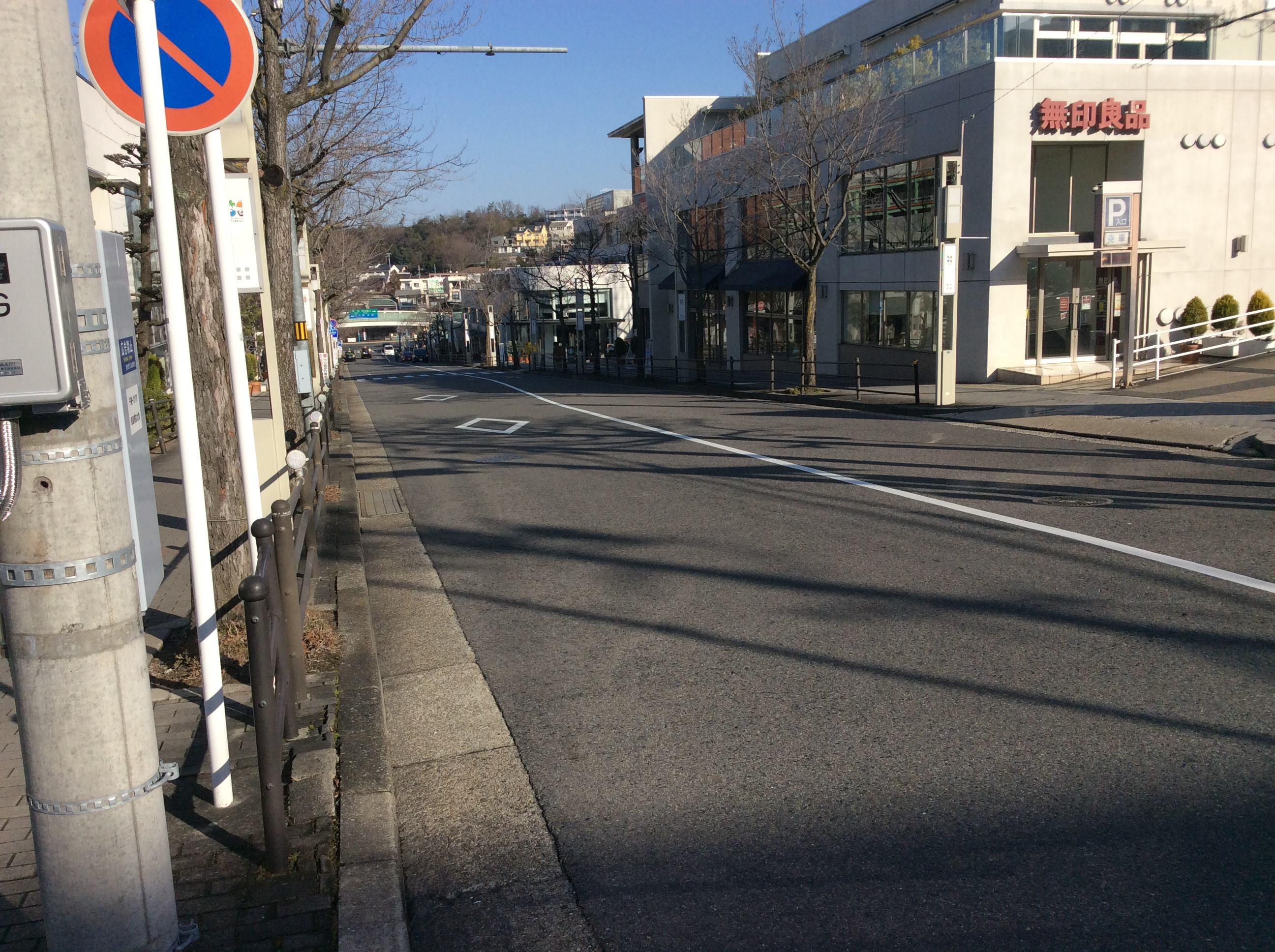 菊里高校 - 星が丘テラス - 星ヶ丘駅方面